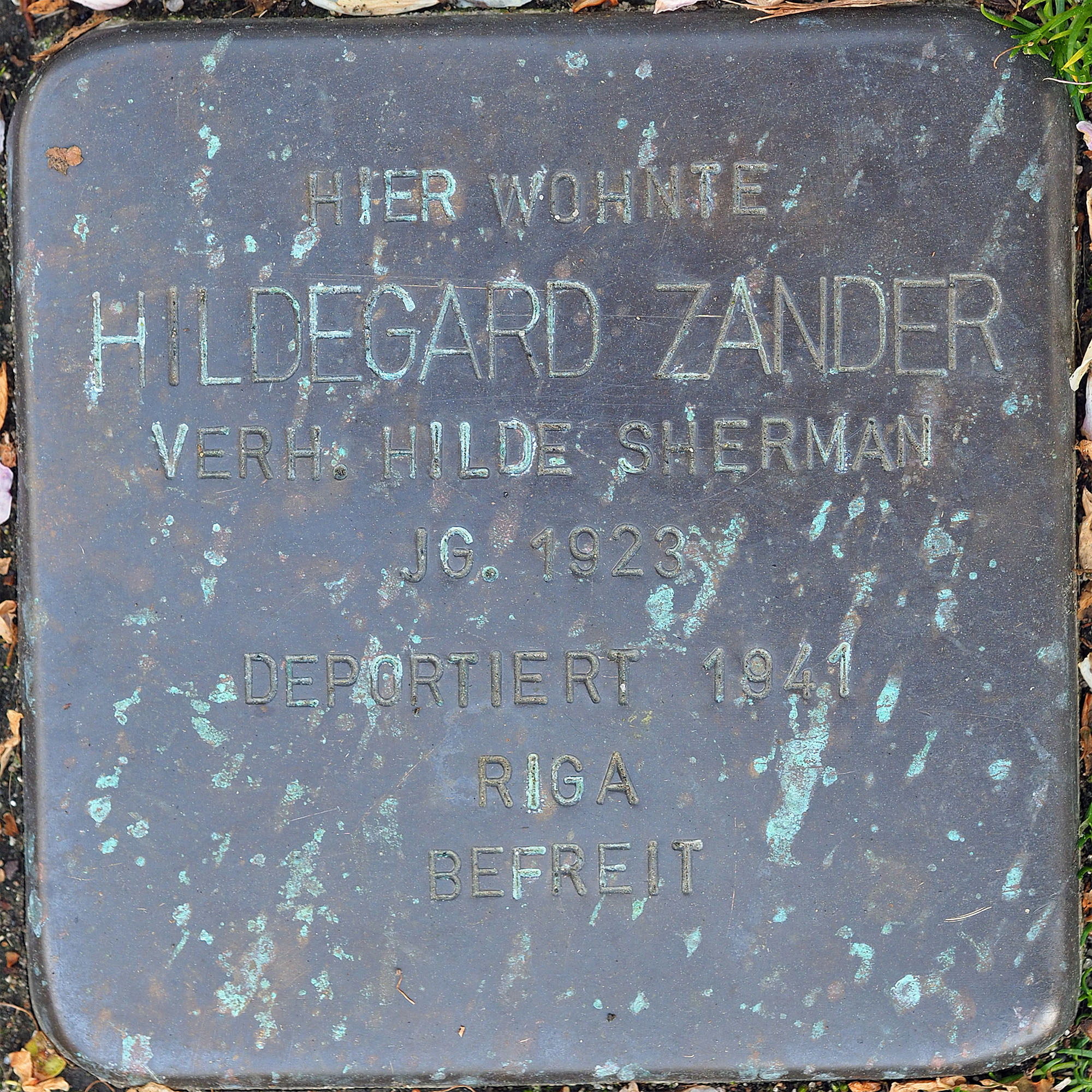 Stolpersteine MG: Zander, Hildegard